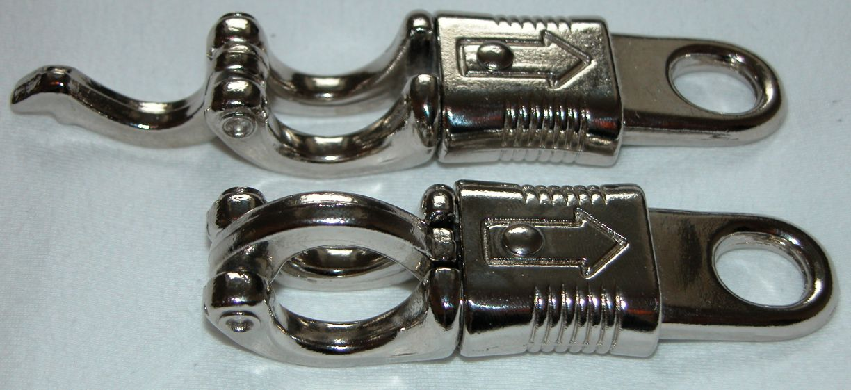 panic snaps